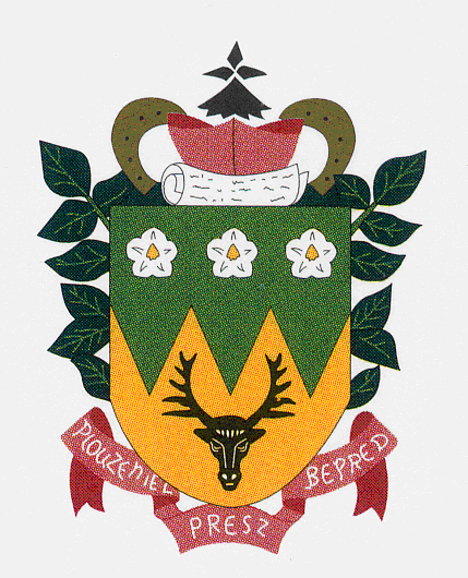 Le blason de Ploudaniel (Plouzeniel prest bepred, "Ploudaniel toujours prêt")